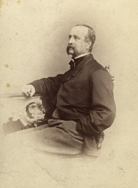 Greve Axel Jakob de la Gardie.